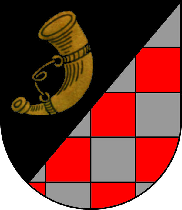 Wappen von Horbruch